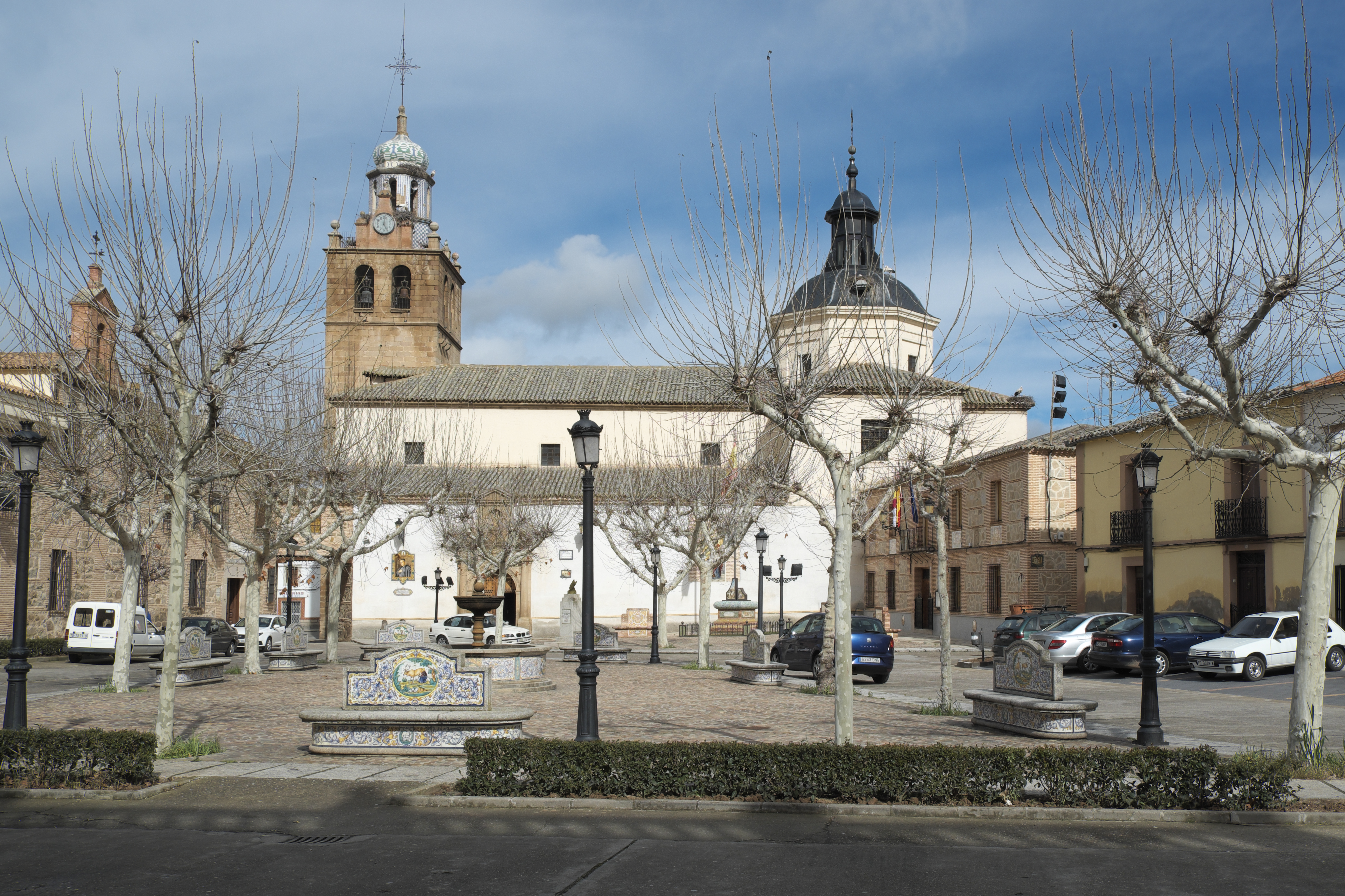 Katholische Pfarrkirche Santa Catalina in El Puente del Arzobispo in der Provinz Toledo (Kastilien-La Mancha/Spanien)